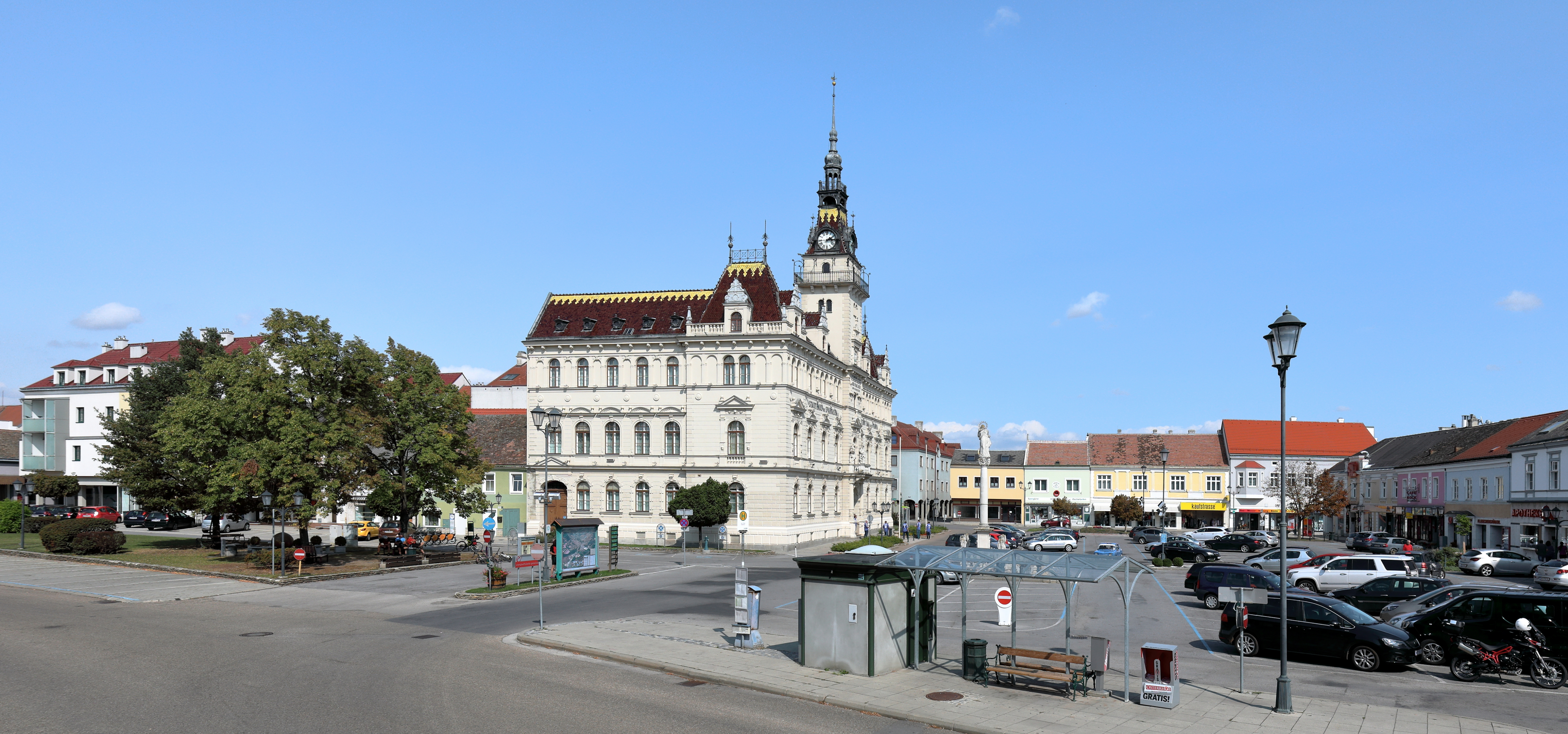 Der Stadtplatz mit dem Rathaus und der Mariensäule in der niederösterreichischen Stadt Laa an der Thaya. Das Rathaus wurde 1898/99 nach Plänen des Architekten Peter Paul Brang errichtet und die Mariensäule ist mit 1680 datiert.